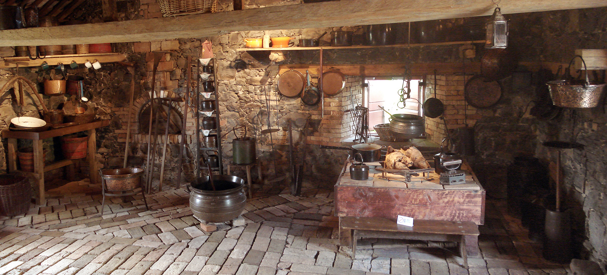 Interior da cozinha do Museu da Casa de Pedra, em Caxias do Sul, Brasil